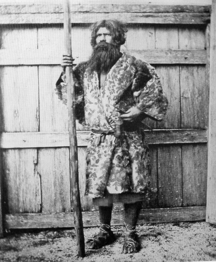 Ainu man